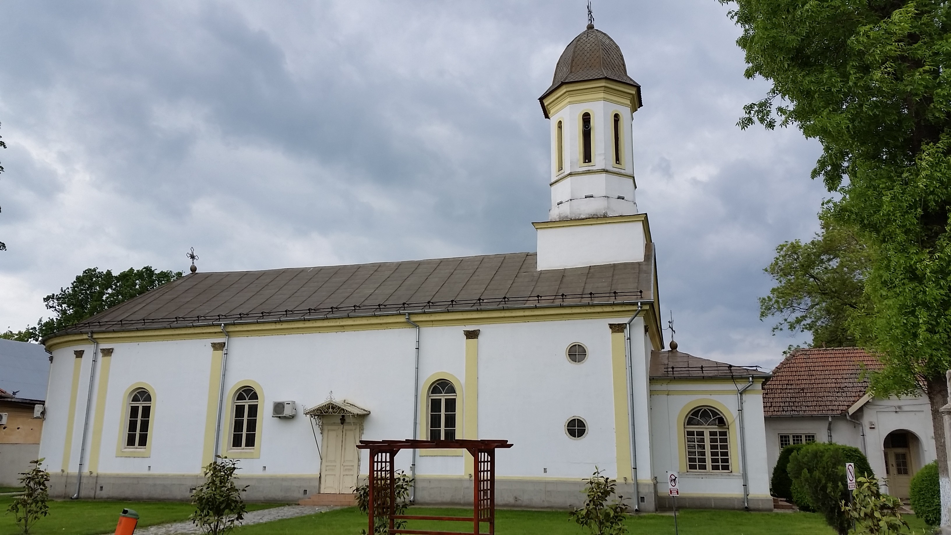 Biserica „Sf. Apostoli”